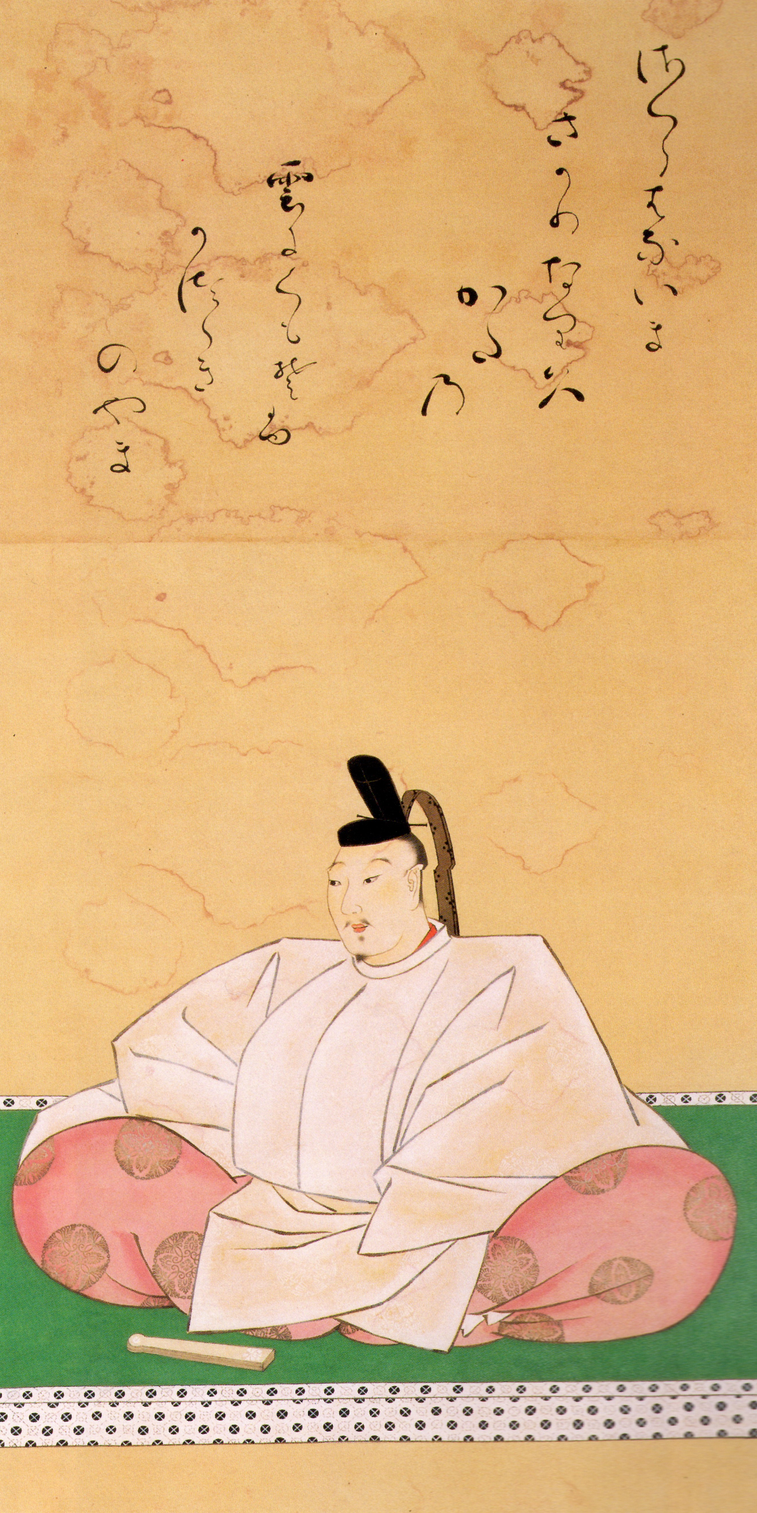 冷泉為秀の肖像。